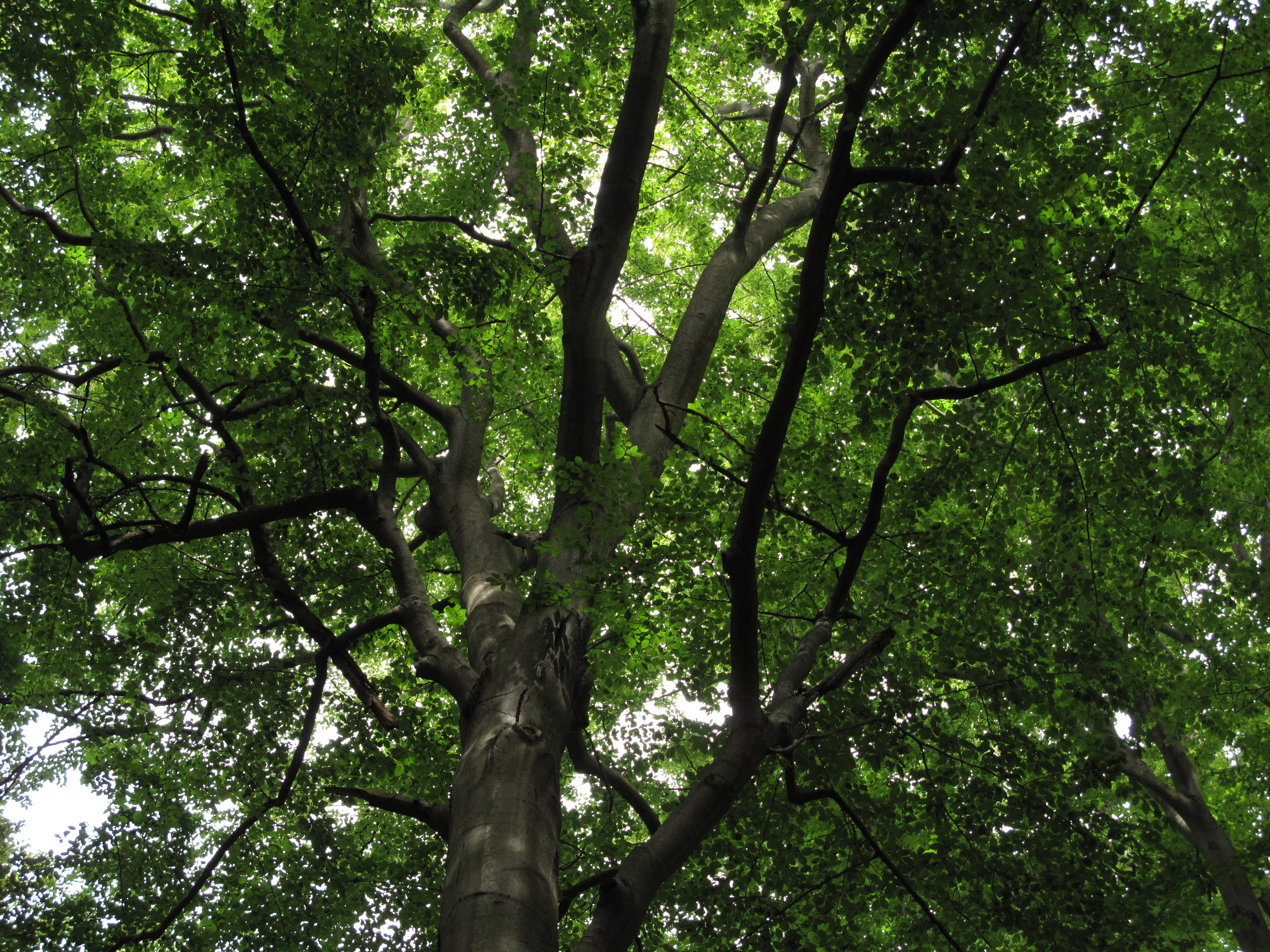 Koruna stromu v národní přírodní rezervaci Kohoutov. Okres Rokycany, Česká republika.